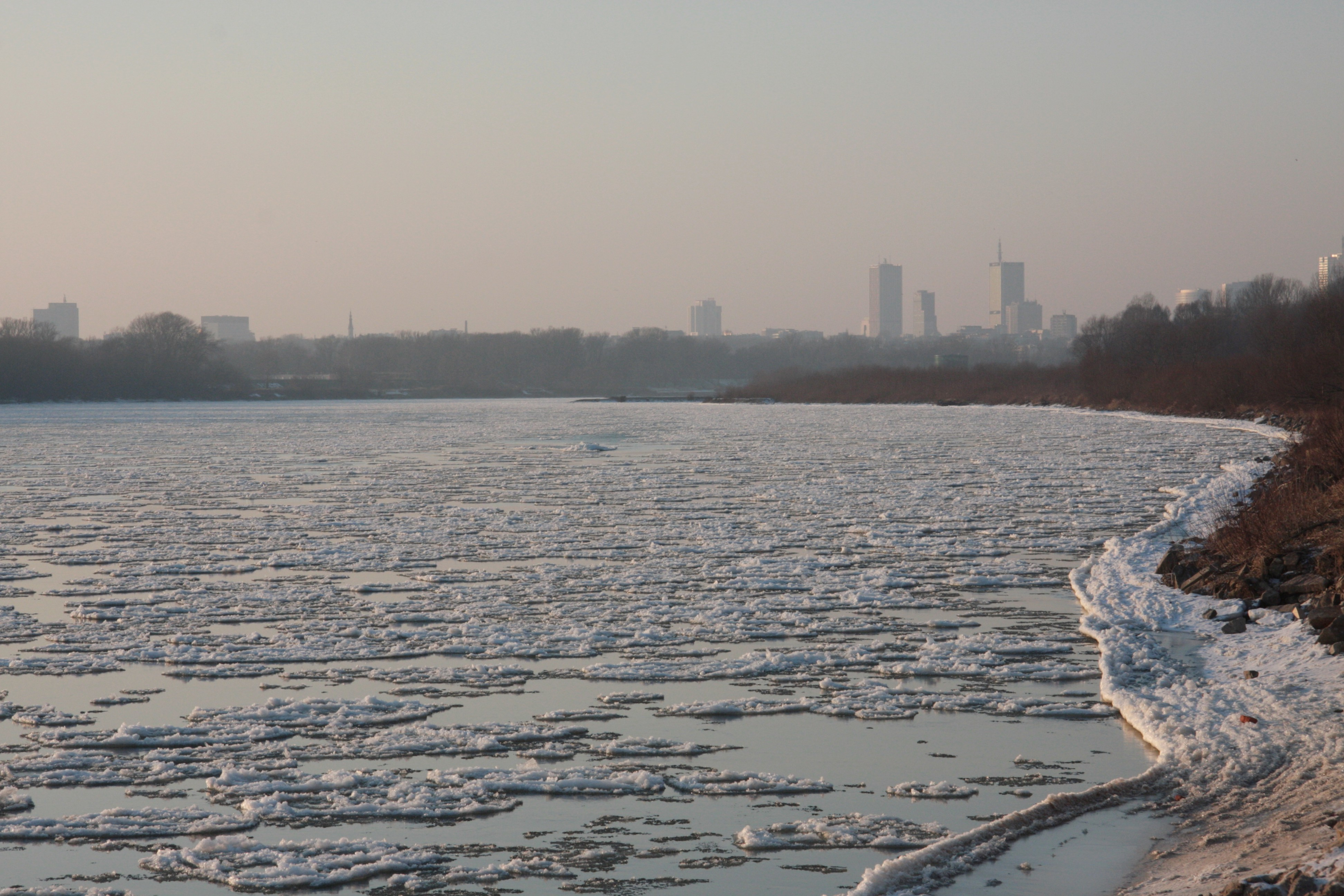 Śryż na Wiśle w Warszawie